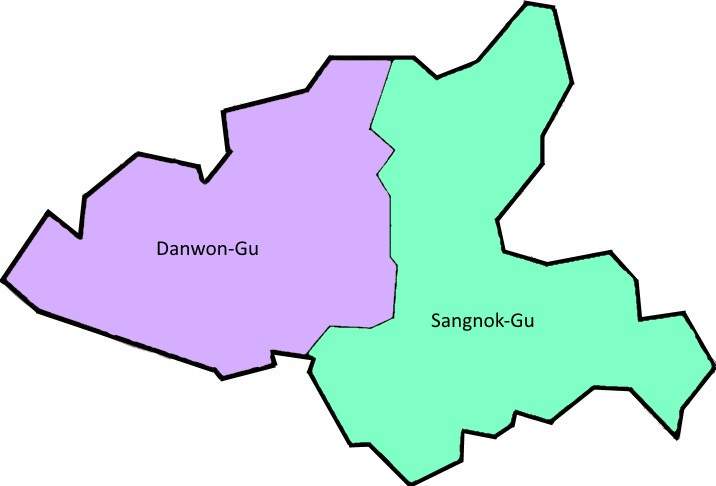 안산의 지도